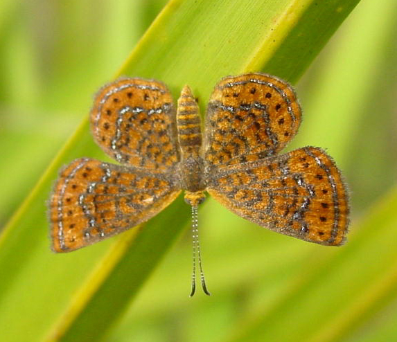 Calephelis virginiensis, Little Metalmark on Saw Palmetto 1, SPPSP, 7-26-03